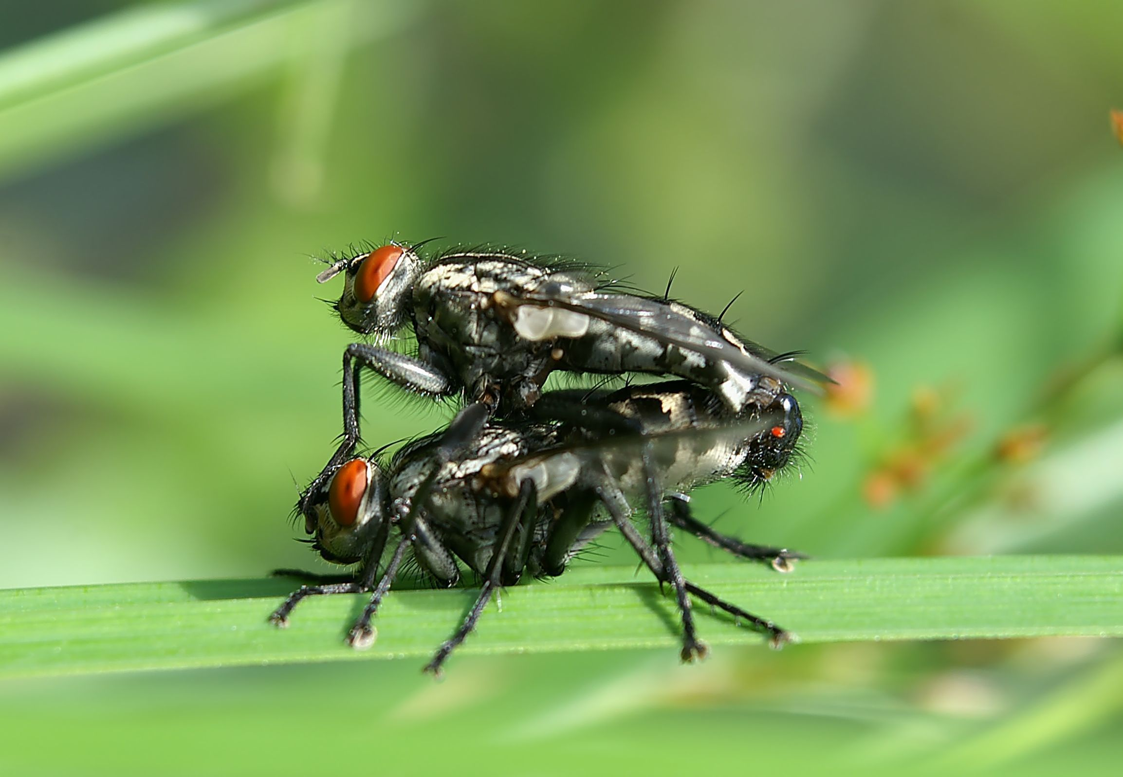 Kopulierende Fleischfliegen (Sarcophaga carnaria)